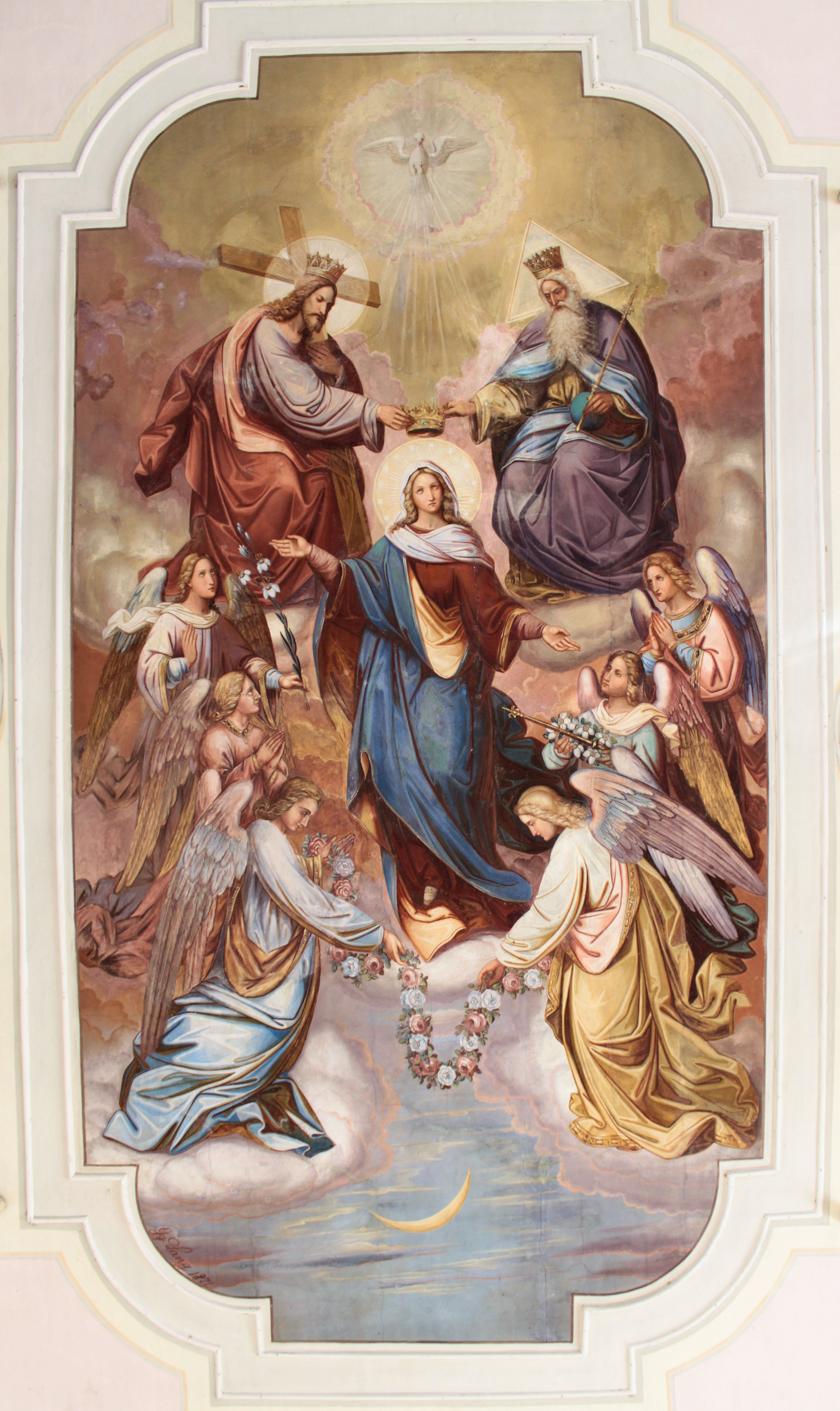 Deckengemälde der Pfarrkirche Mariä Himmelfahrt in Walting, Markt Pleinfeld